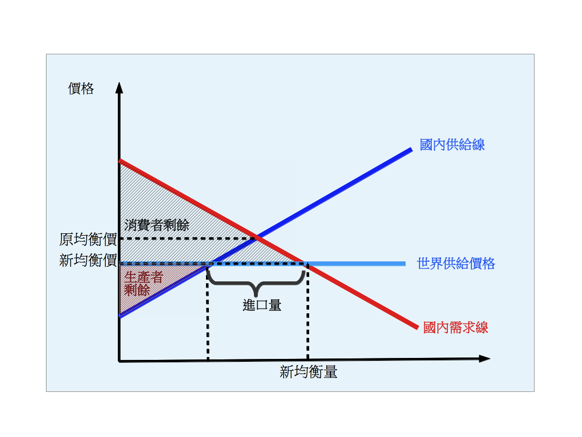 貿易後，供需圖中生產者與消費者剩餘變動